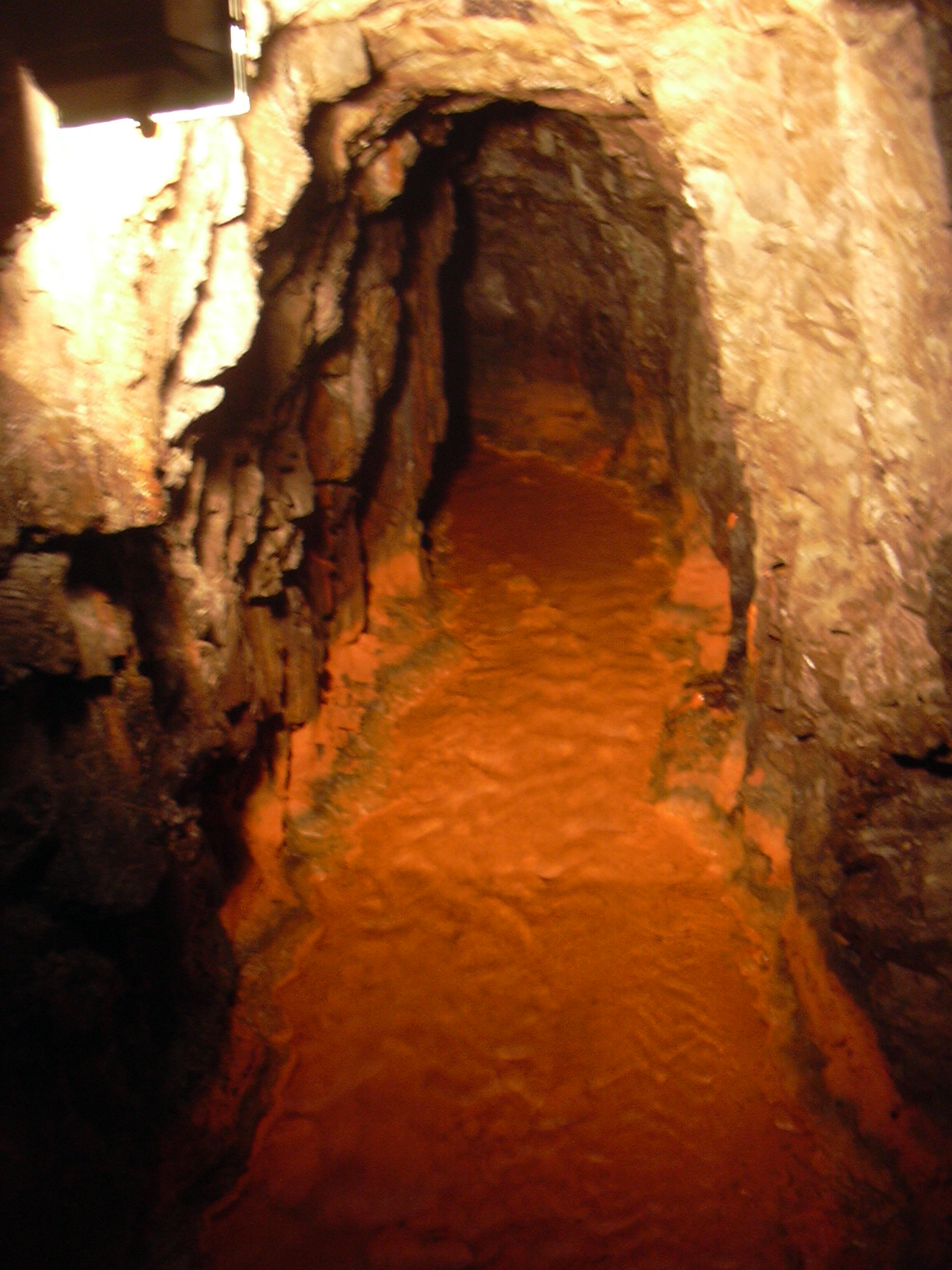 Grube Wohlfahrt (former lead mine), near Hellenthal/Eifel